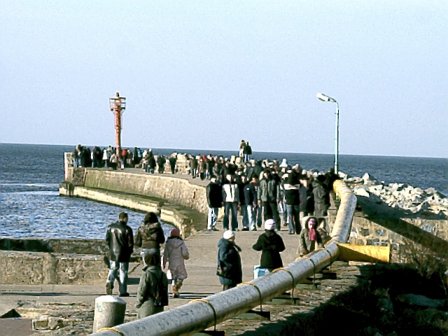 Ustka, molo